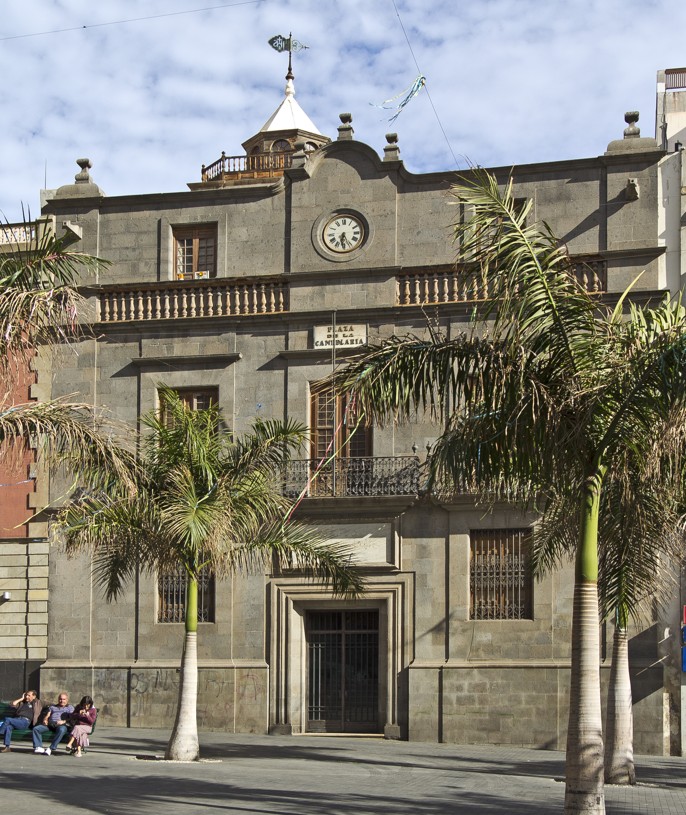 Der Palacio de Carta an der Plaza de la Candelaria wurde zwischen 1721 und 1752 erbaut.